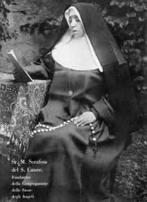 Foto antica